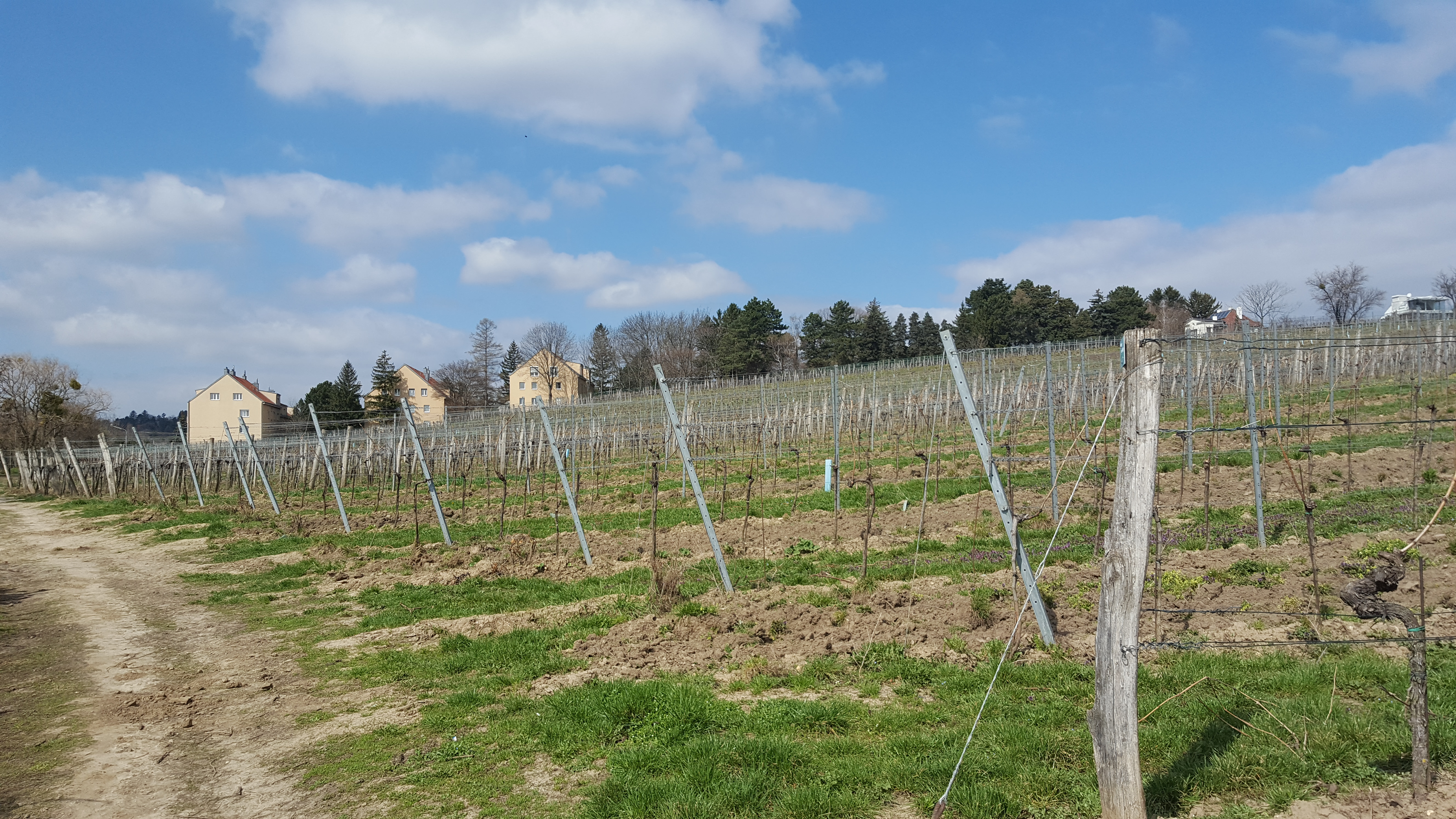 Hungerberg